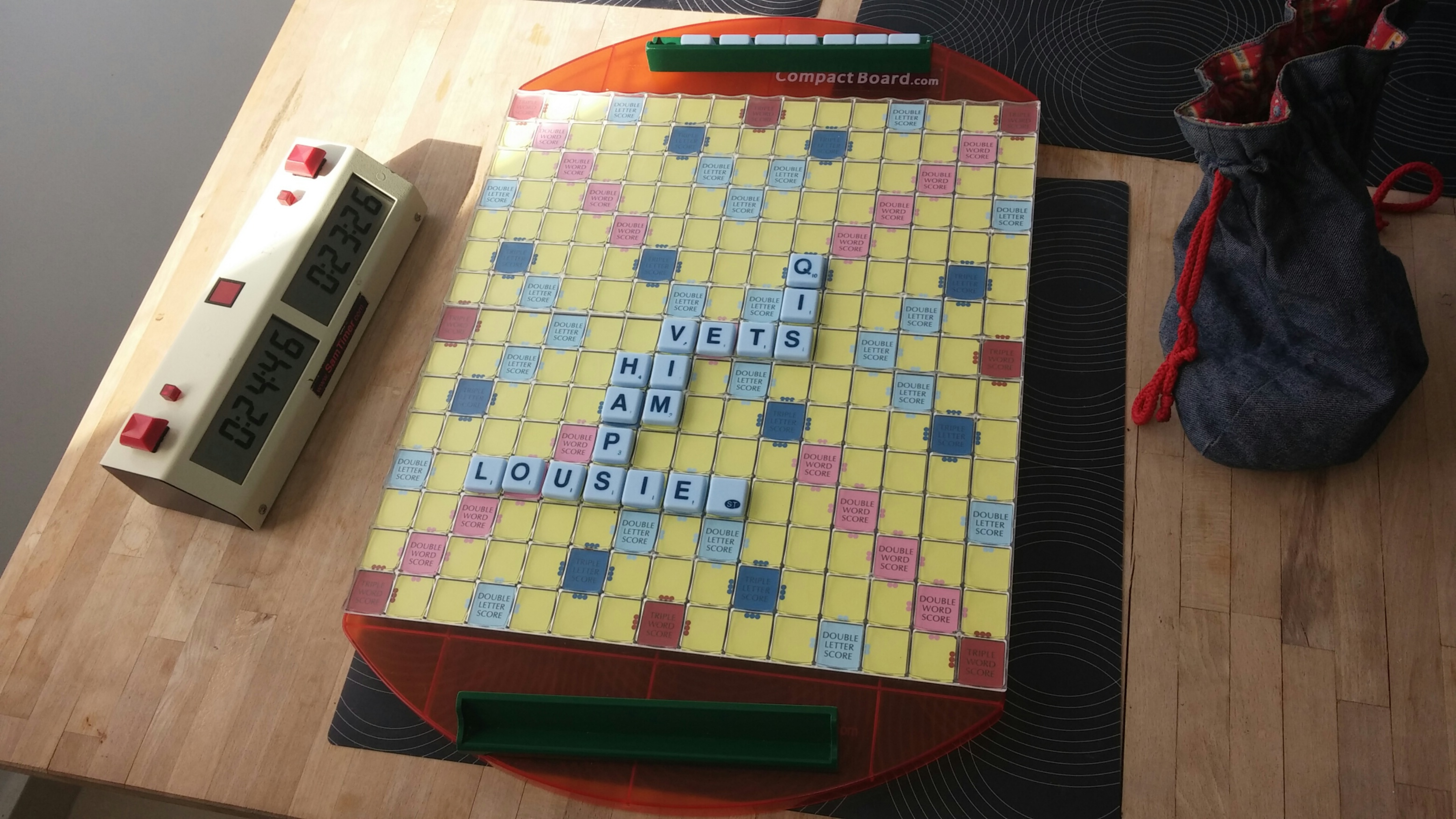 המשחק נפתח במילה VET על הכוכב המרכזי. המהלך השני היה QIS, ואחריו VIM ו-HAP. במהלך האחרון השחקן הקרוב למצלמה שיחק "בינגו", את המילה ?LOUSIE, כאשר האות הריקה מייצגת את האות R, וזכה בבונוס של 50 נקודות